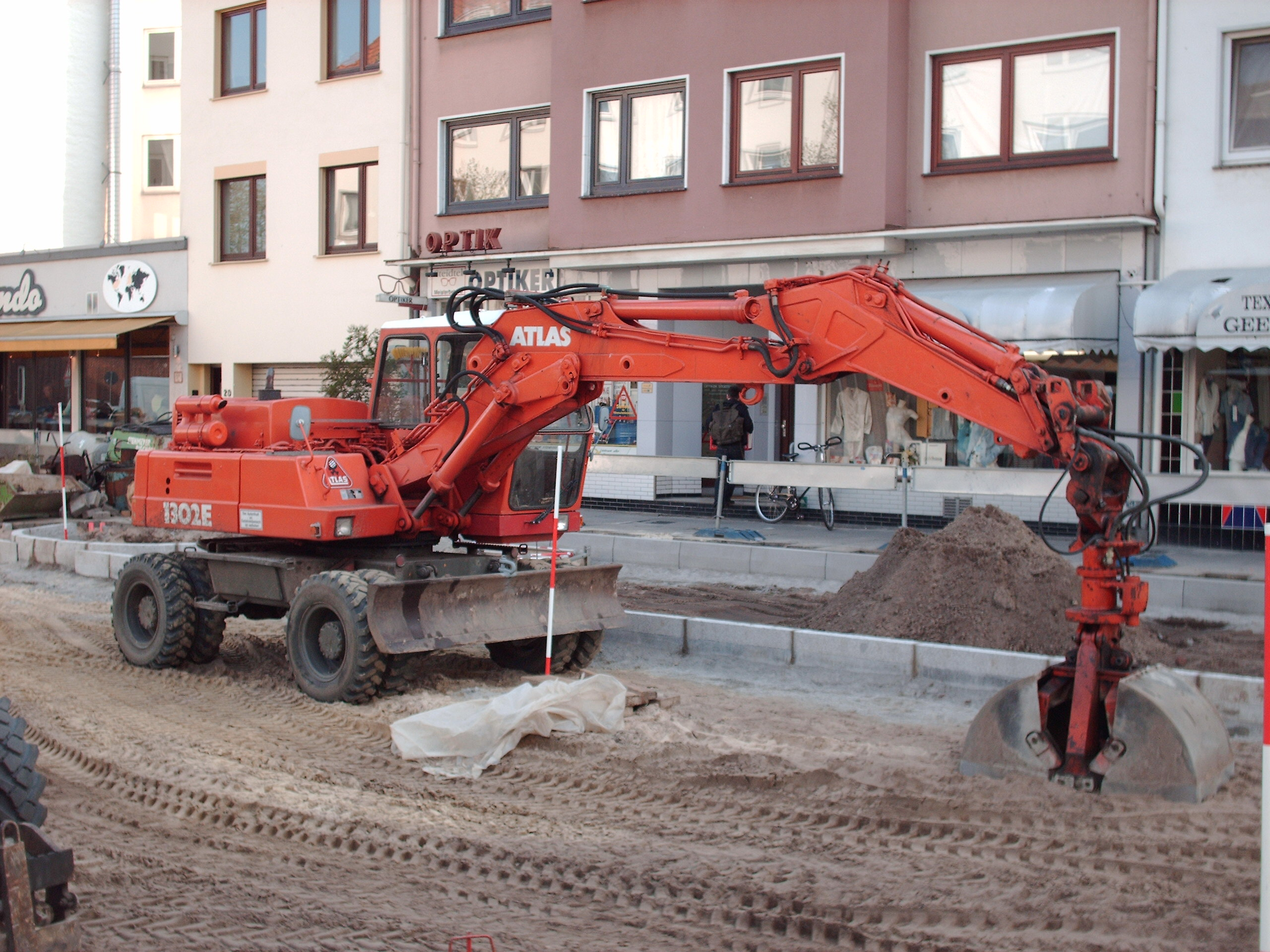 Atlas 1302E gravemaskine på gummihjul, monteret med jordgrab